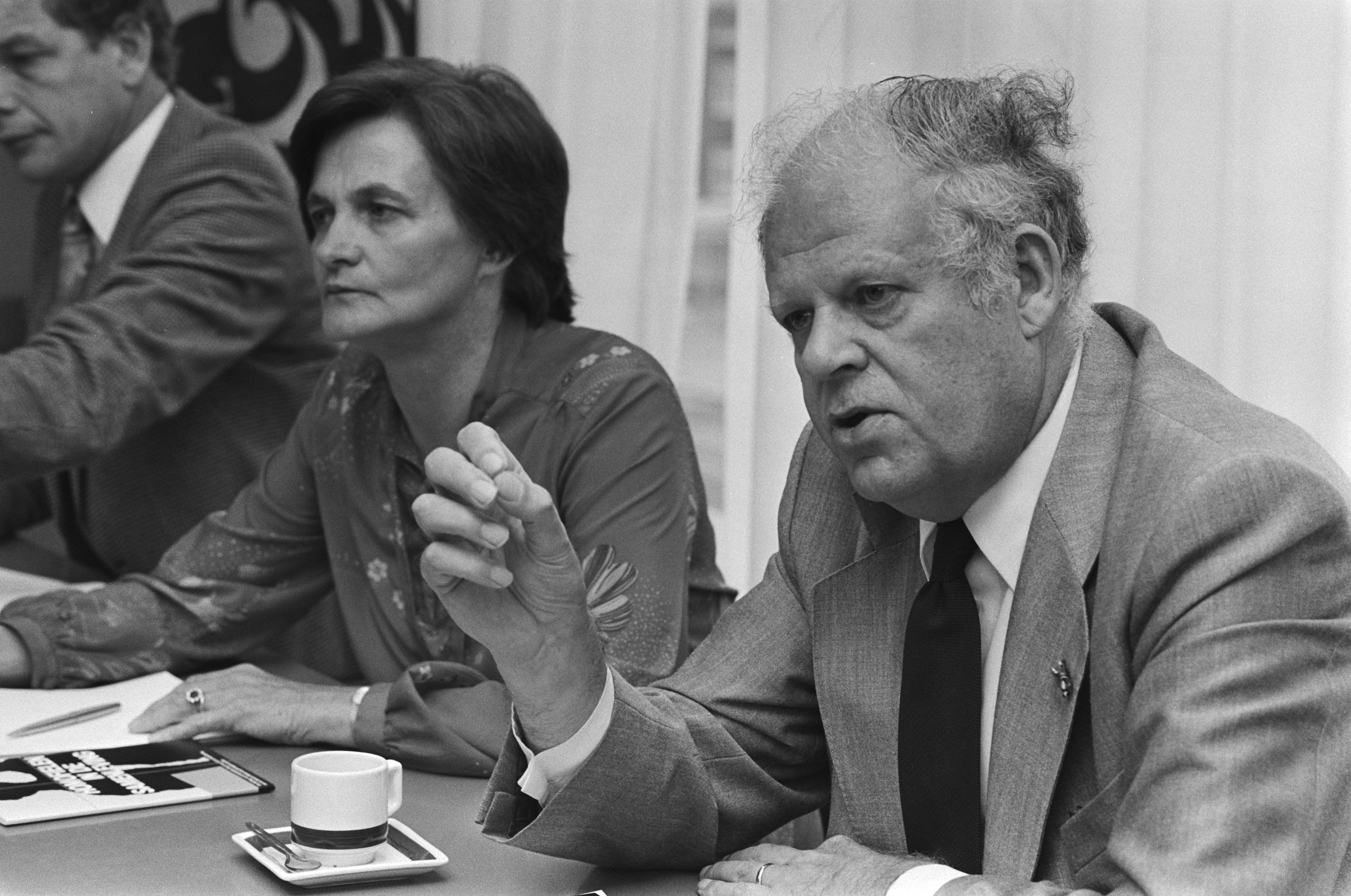 Collectie / Archief : Fotocollectie Anefo Reportage / Serie : "Homofielen in de Samenleving", presentatie van een nota door de Katholieke Raad voor Kerk en Samenleving Beschrijving : Professor dr. A.G.M. van Melsen raadslid en mederedacteur van de nota. Links Mevrouw mr. G. Hoynck van Papendrecht, vice-voorzitter van de Raad Datum : 21 augustus 1979 Locatie : Utrecht (prov), Utrecht (stad) Trefwoorden : homoseksualiteit, kerken, vergaderingen, voorzitters Persoonsnaam : Hoynck van Papendrecht, G, Melsen, A.G.M. van Fotograaf : Suyk, Koen / Anefo Auteursrechthebbende : Nationaal Archief Materiaalsoort : Negatief (zwart/wit) Nummer archiefinventaris : bekijk toegang 2.24.01.05 Bestanddeelnummer : 930-4052